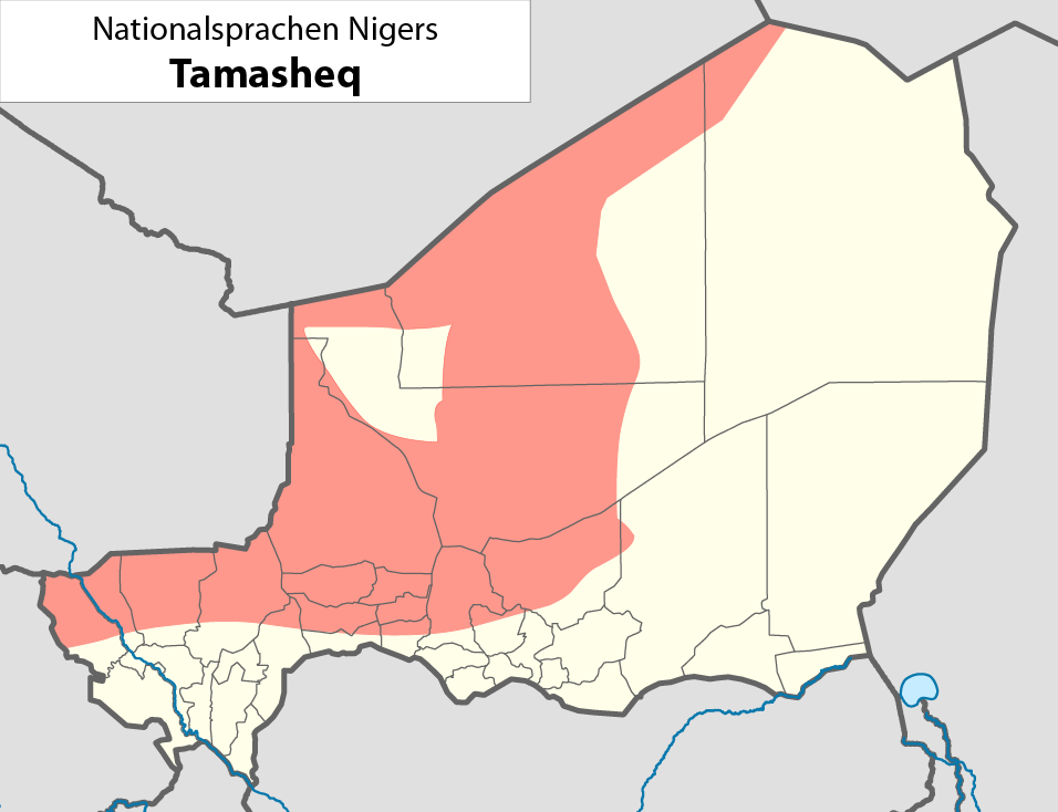 Nationalsprachen des NigerDie dargestellte Nationalsprache kann dem Dateinamen entnommen werden.